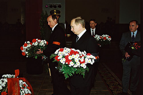 МОСКВА. Траурная церемония прощания с заместителем директора ФСБ Германом Угрюмовым.